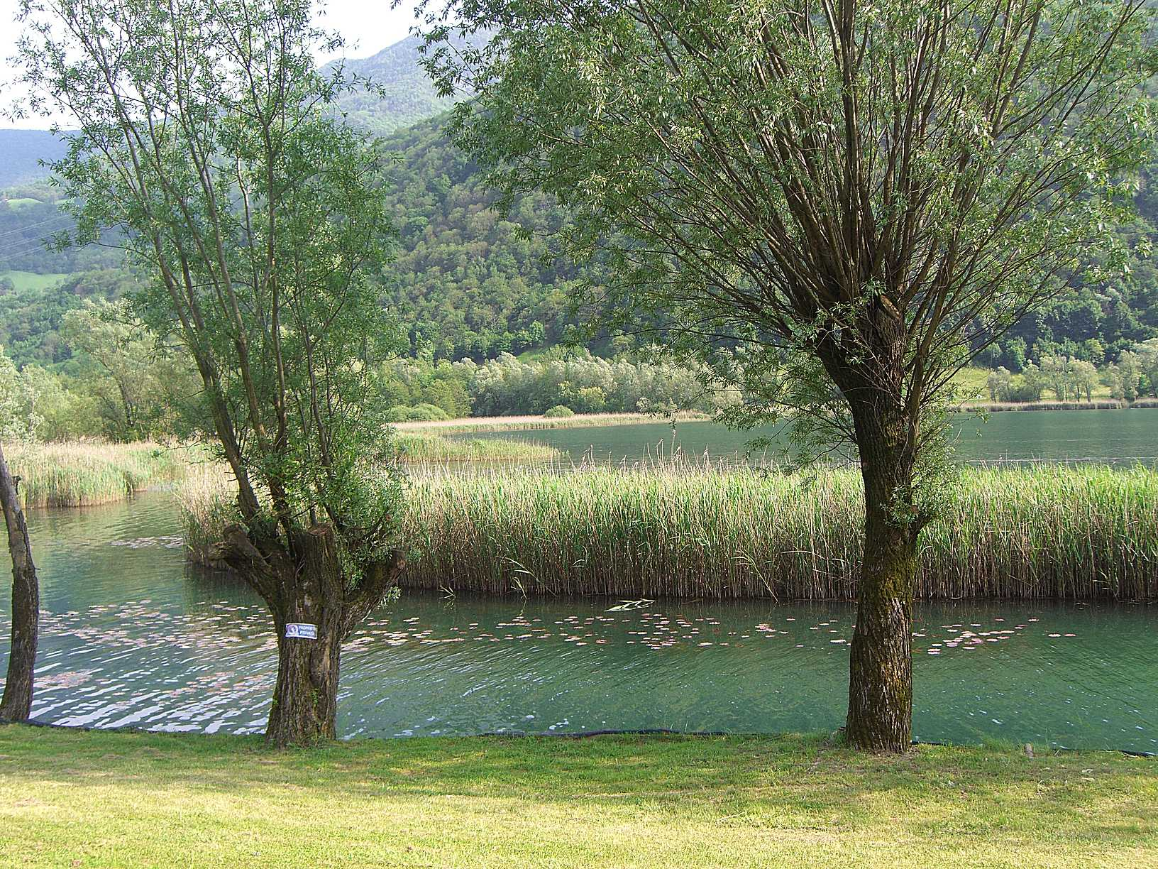 BG Endine Gaiano - lungo lago passeggiata verso Ranzanico - salici e canneto di Phragmites australis